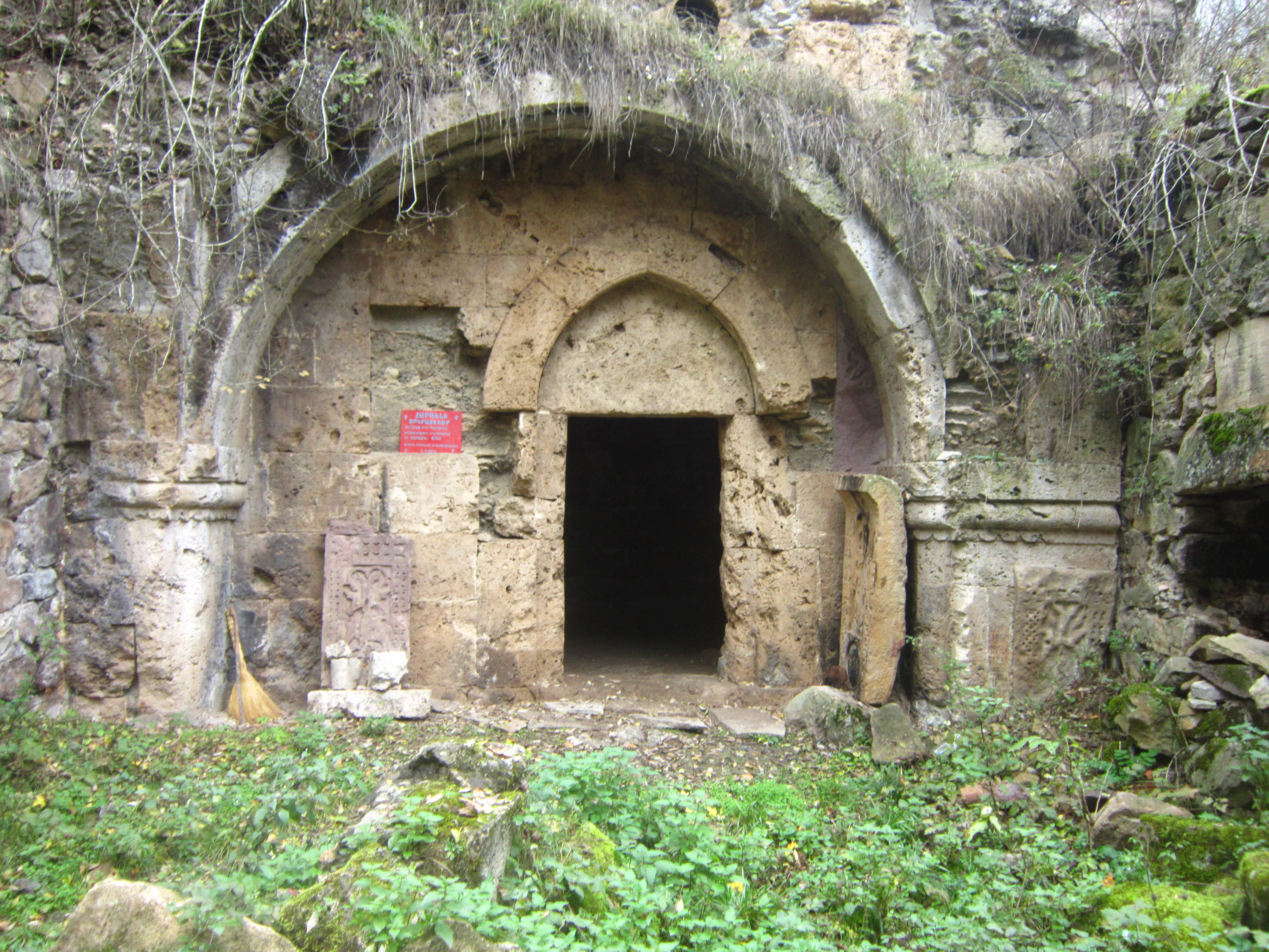 Վանական համալիր Շխմուրադ 38/16